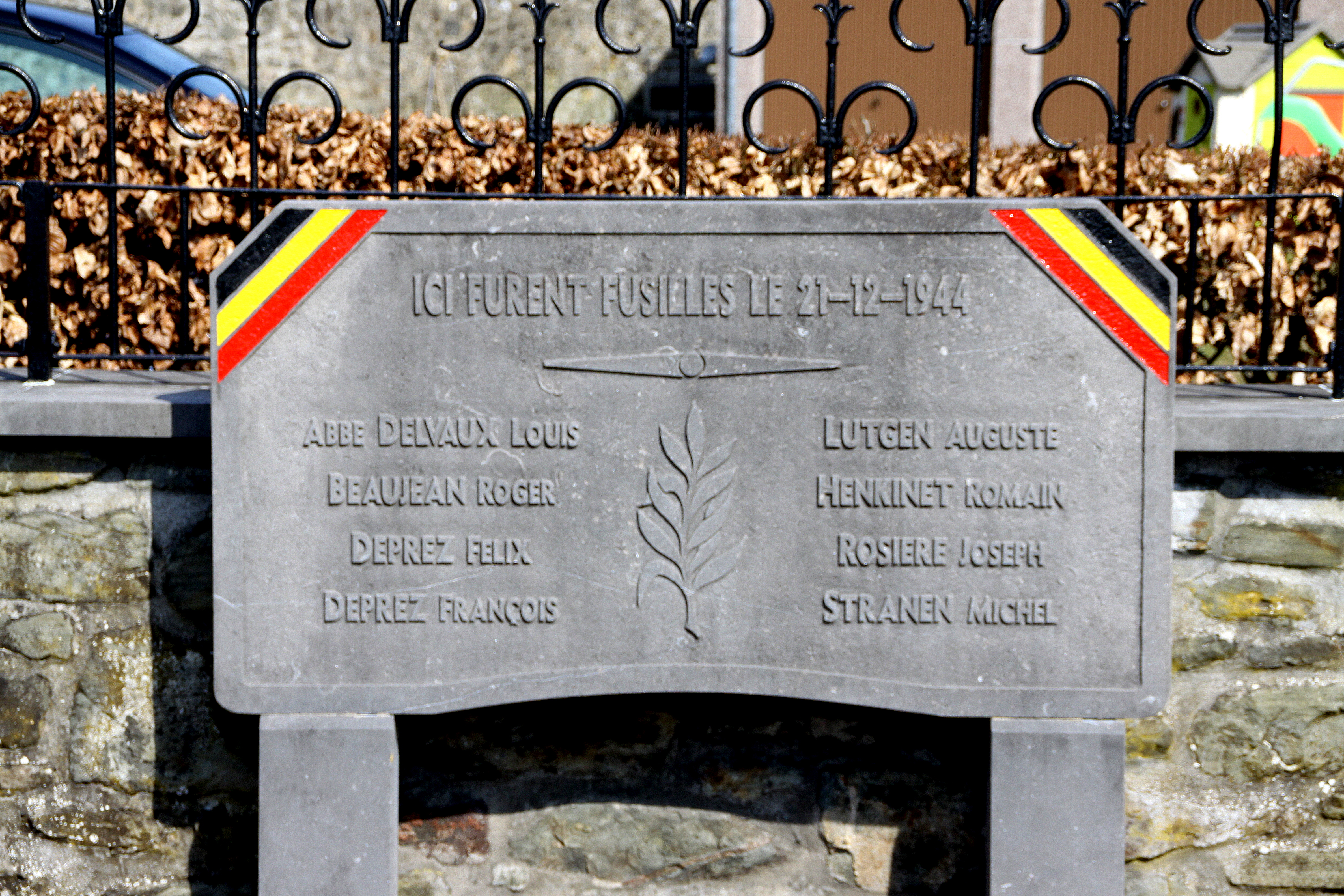 Gedenkplack am Enclos des fusillés zu Noville